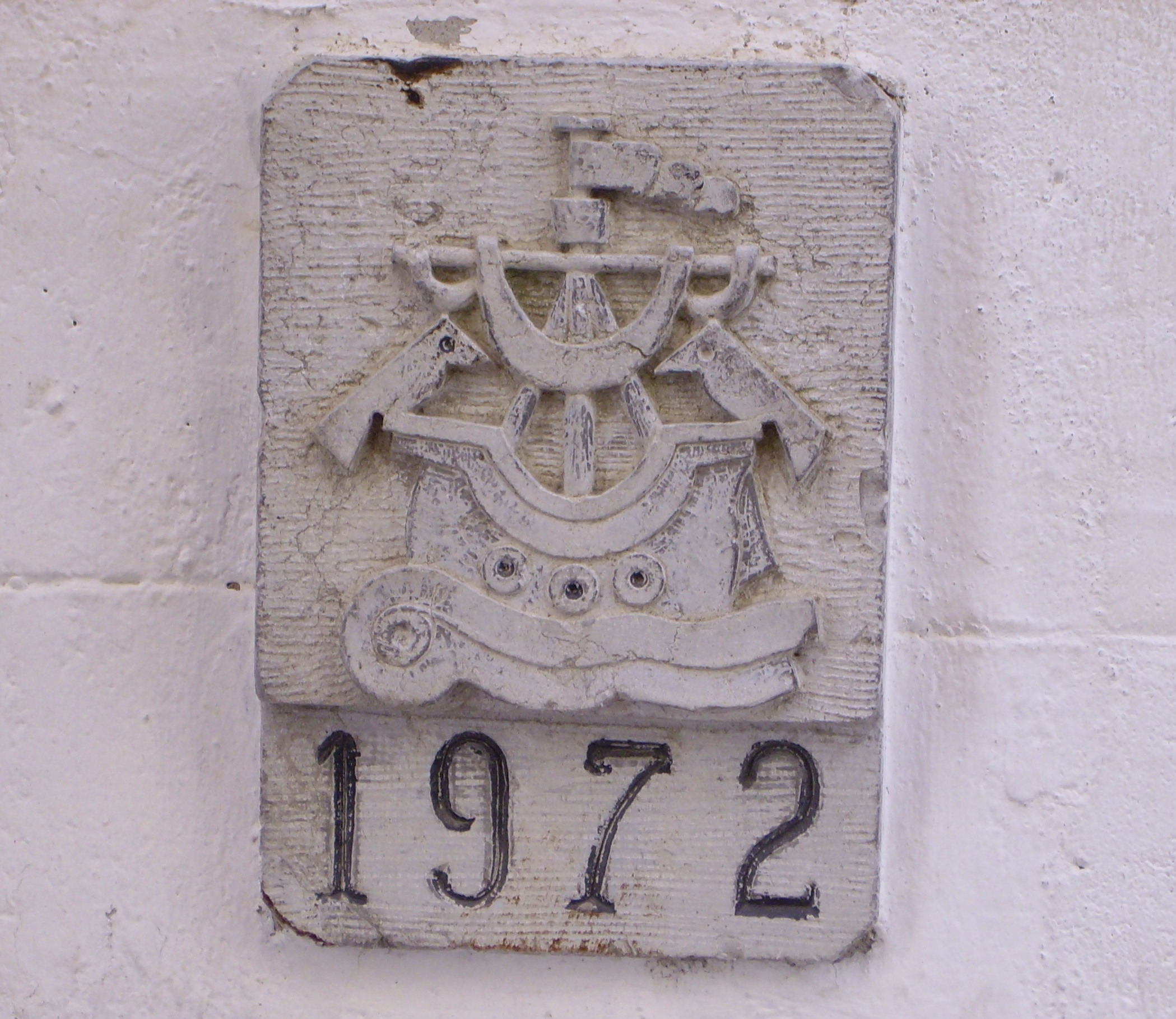 Lisboa